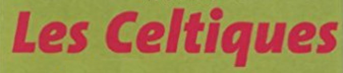 Titre typographié de l'album "Les Celtiques" par Hugo Pratt.